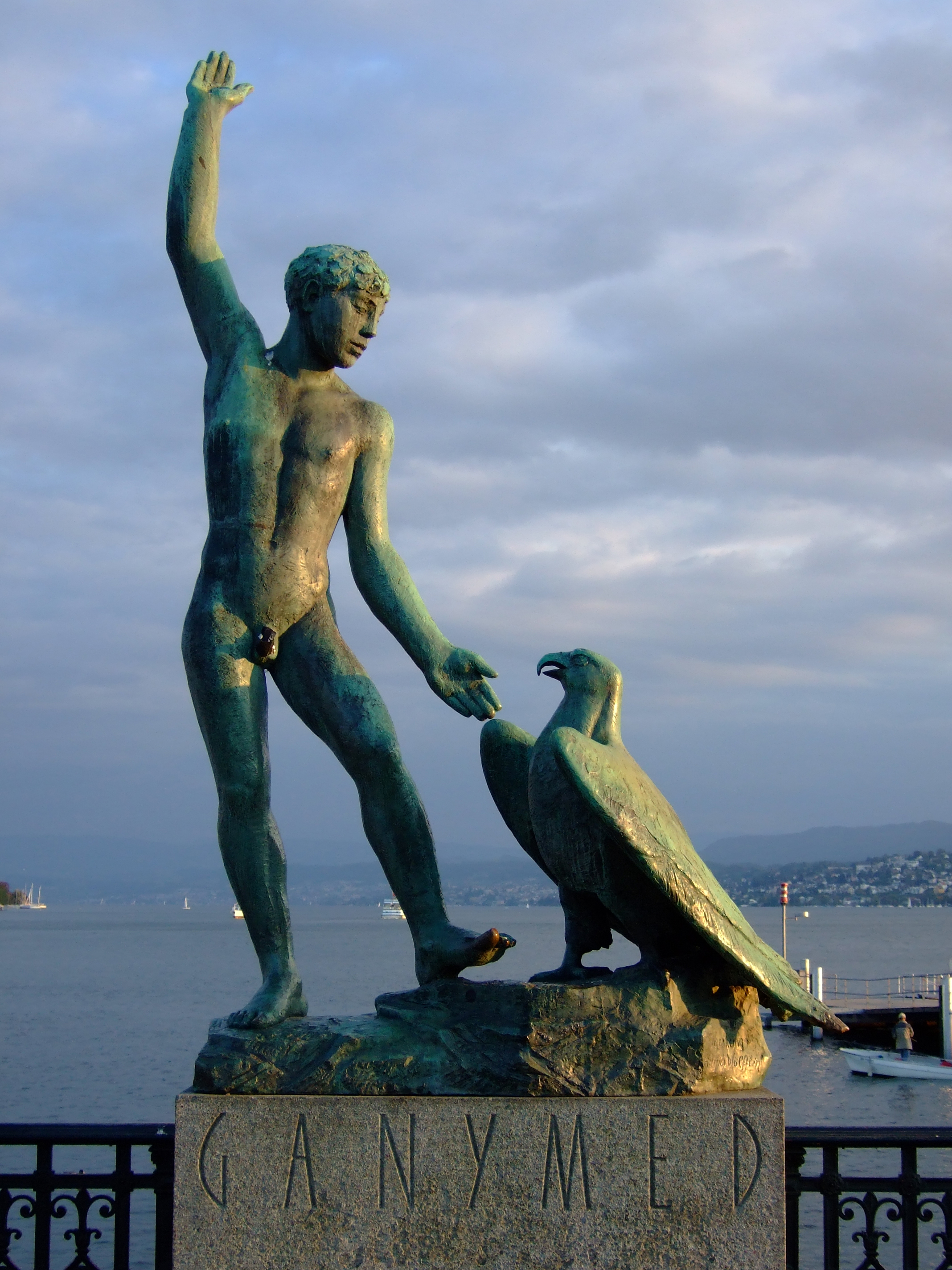 Skulptur "Entführung in den Olymp" von Hermann Hubacher (1952). Zürich, Bürkliterasse.